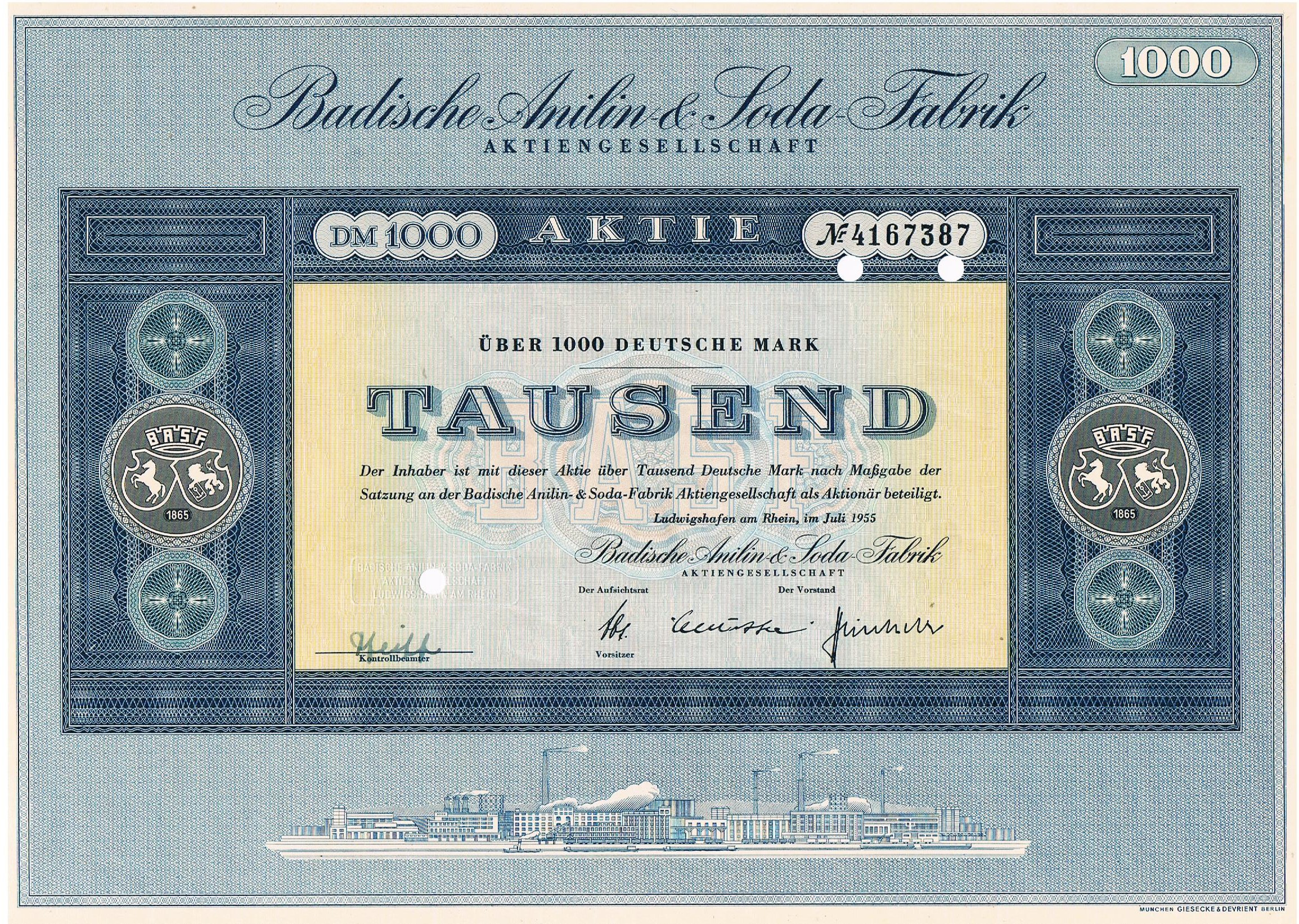 BASF AG (Aktie von 1955)